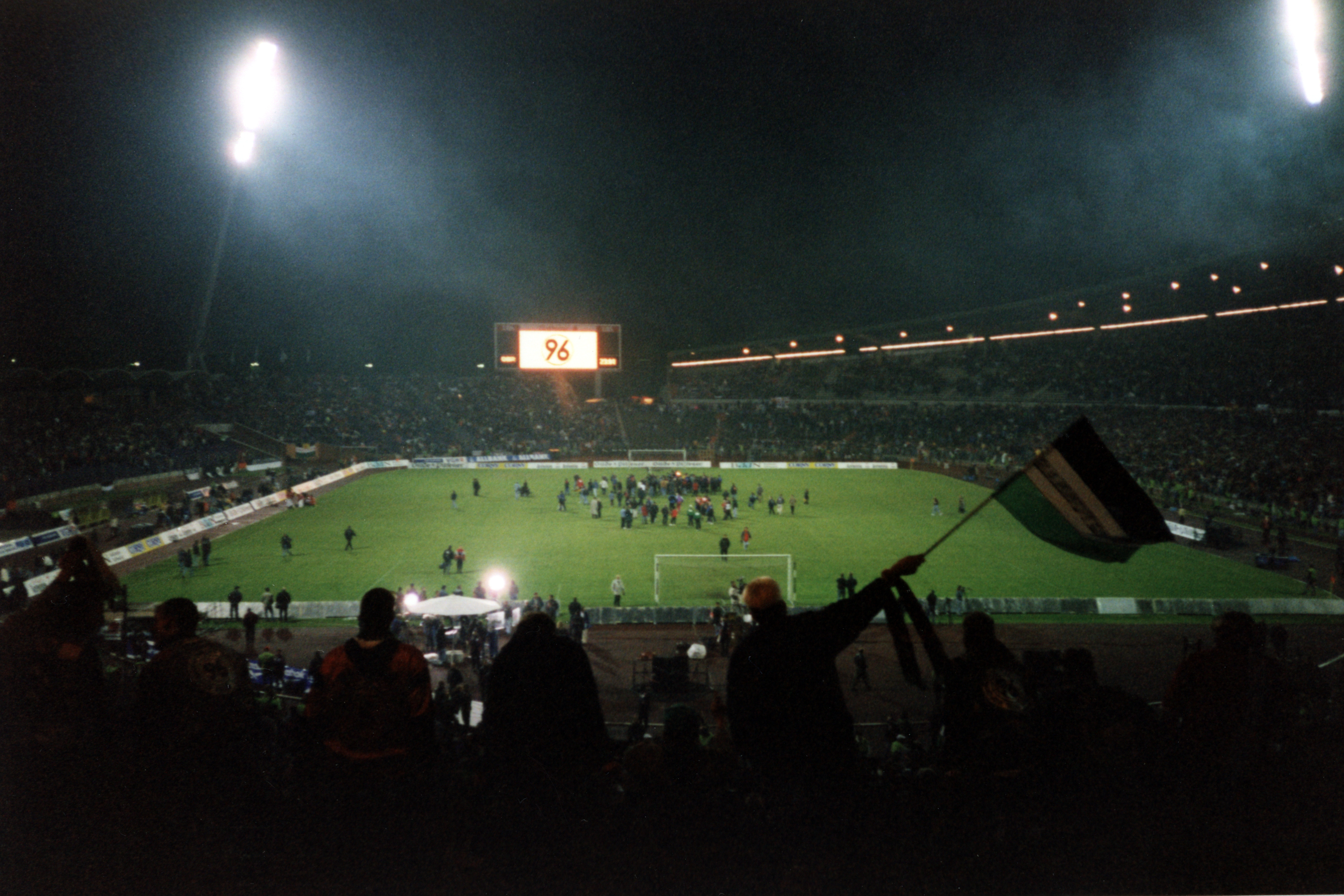 Aufgenommen am 1998-05-24, Relegation zur 2. Fußball-Bundesliga, Hannover 96 gegen Tennis Borussia Berlin im Niedersachsenstadion.